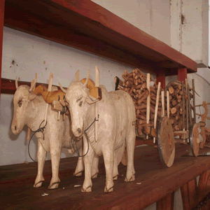 Carros de Boi